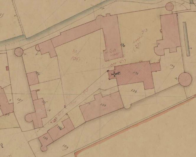 Plan au sol des bâtiments du prieuré sur le cadastre napoléonien de 1832.